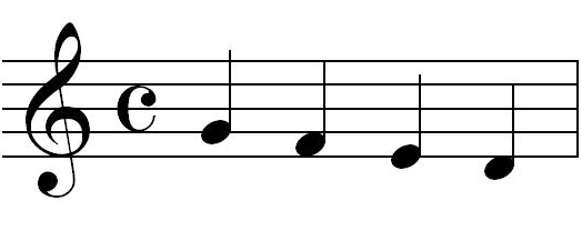 Srpskohrvatski / српскохрватски: Detaše, autor: Radivoj Lazić, lični rad, 23. 9. 2012.